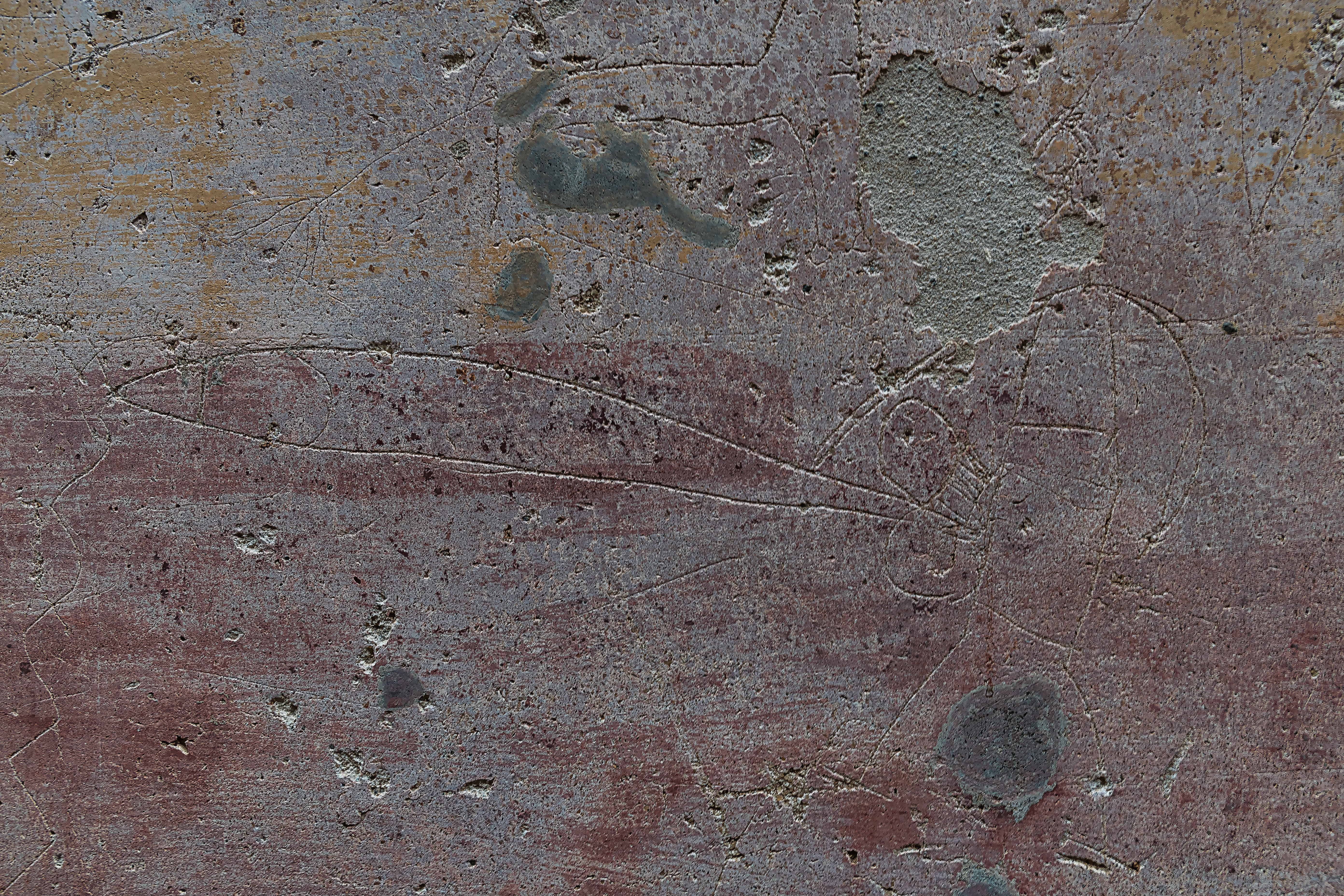 Phallus (Graffiti) am Theatrum tectum (Odeion) in Pompeji